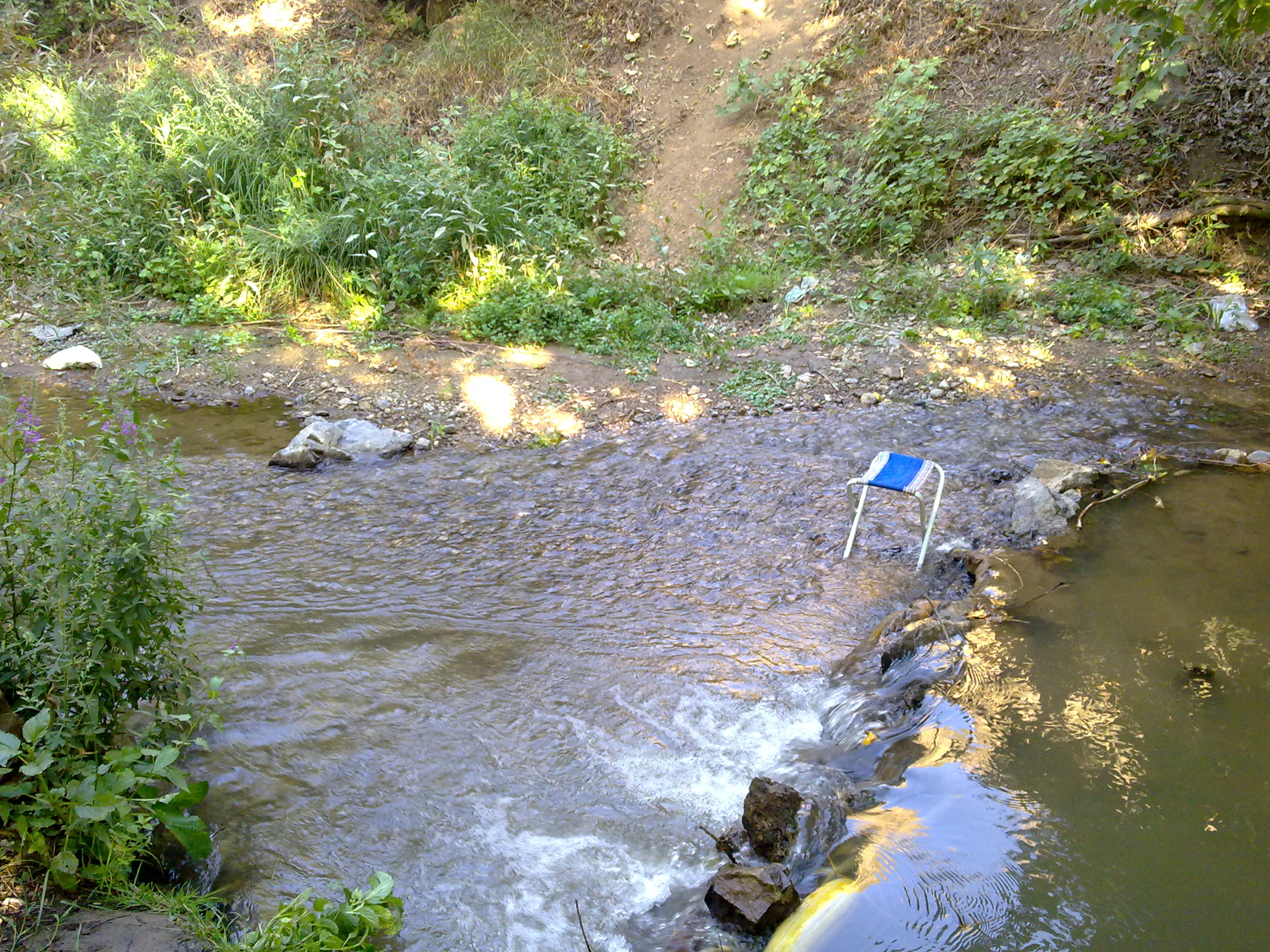 قاسملی دره‌سی